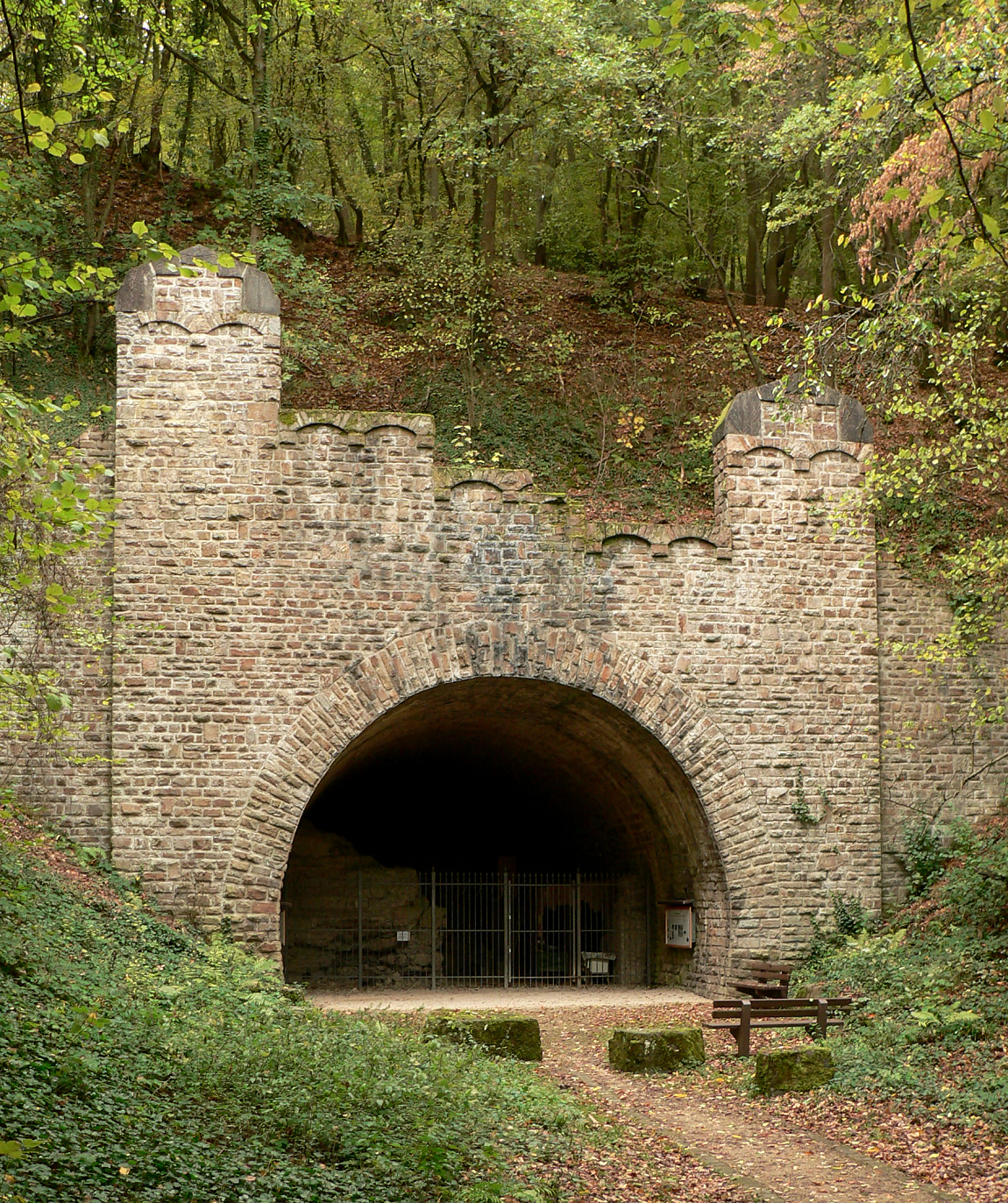 Gedenkstätte Silberbergtunnel